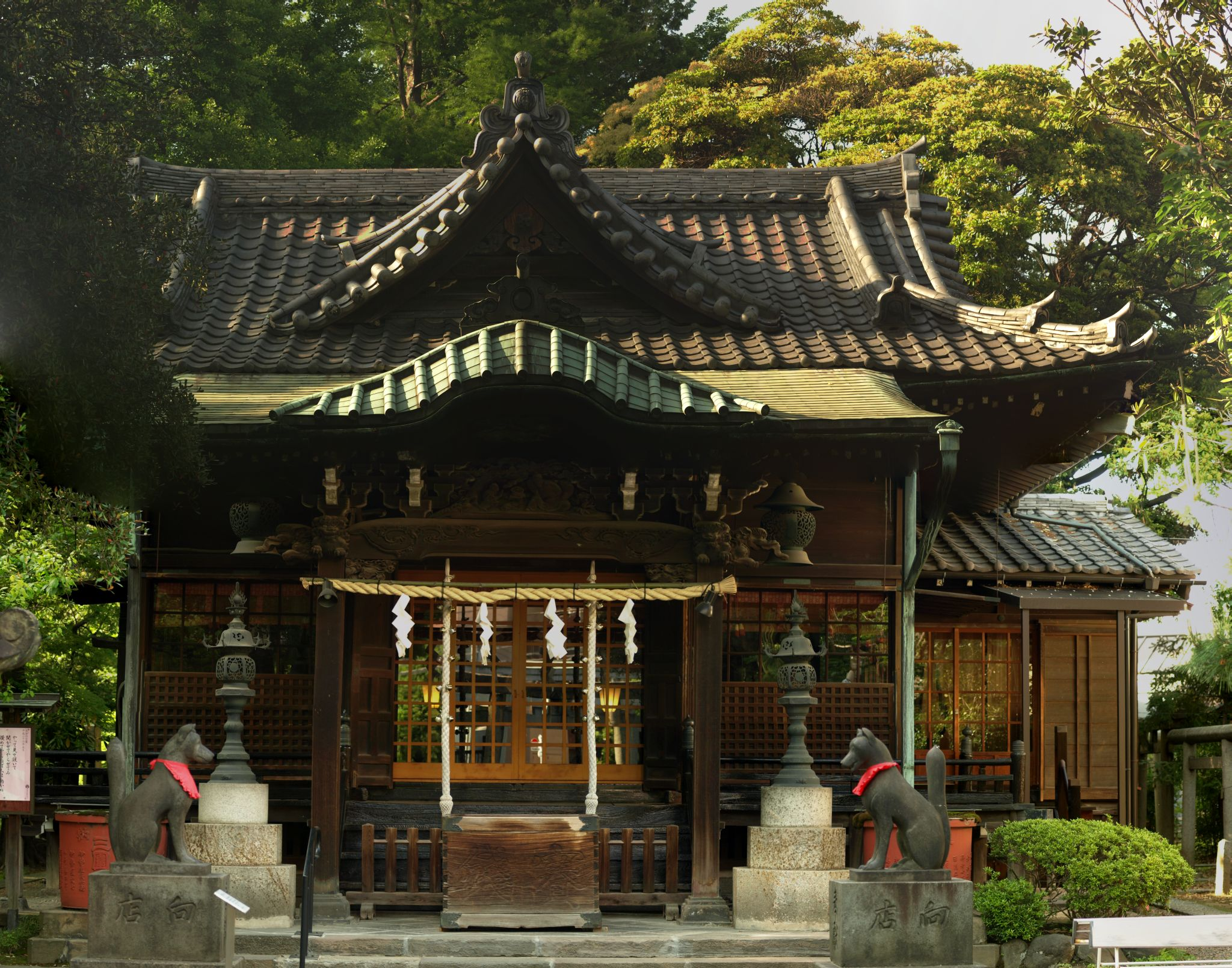 三囲神社の社殿。